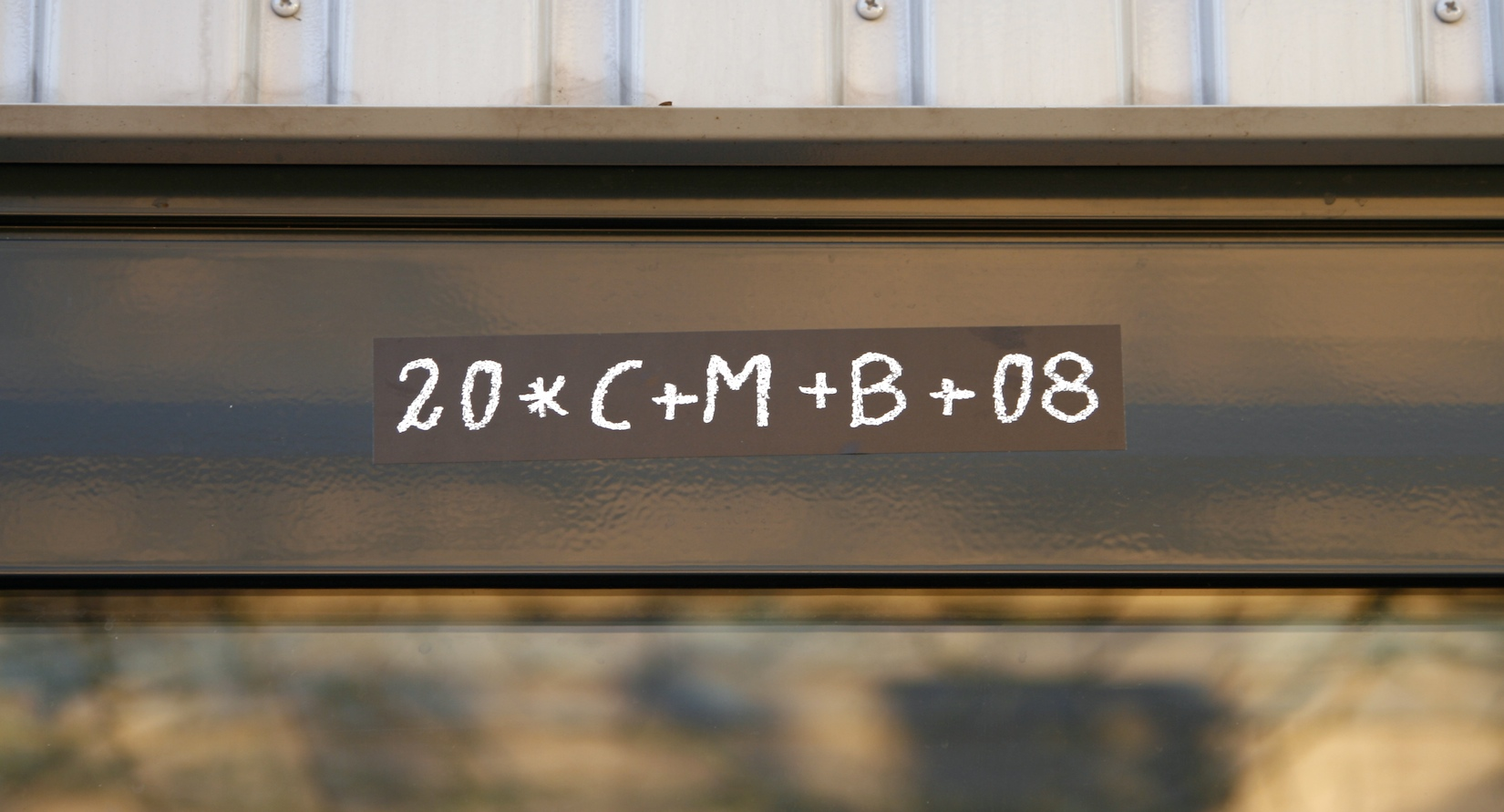 Stäresangen Perl Lycée